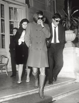 Dalida en pleurs après la mort de son compagnon Luigi Tenco.